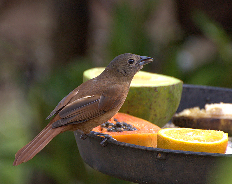 No quintal da casa dos meus pais na cidade de Piraju-SP